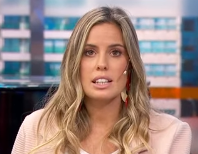 Camila Rajchman en 2019.